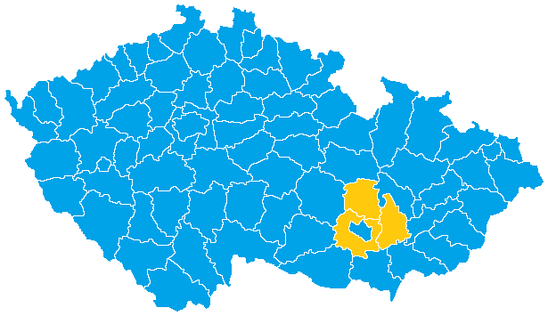 Volby do Sněmovny lidu Federálního shromáždění v roce 1990 - vítězné strany podle okresů (světle modrá Občanské fórum, zlatá Hnutí za samosprávnou demokracii - Společnost pro Moravu a Slezsko)